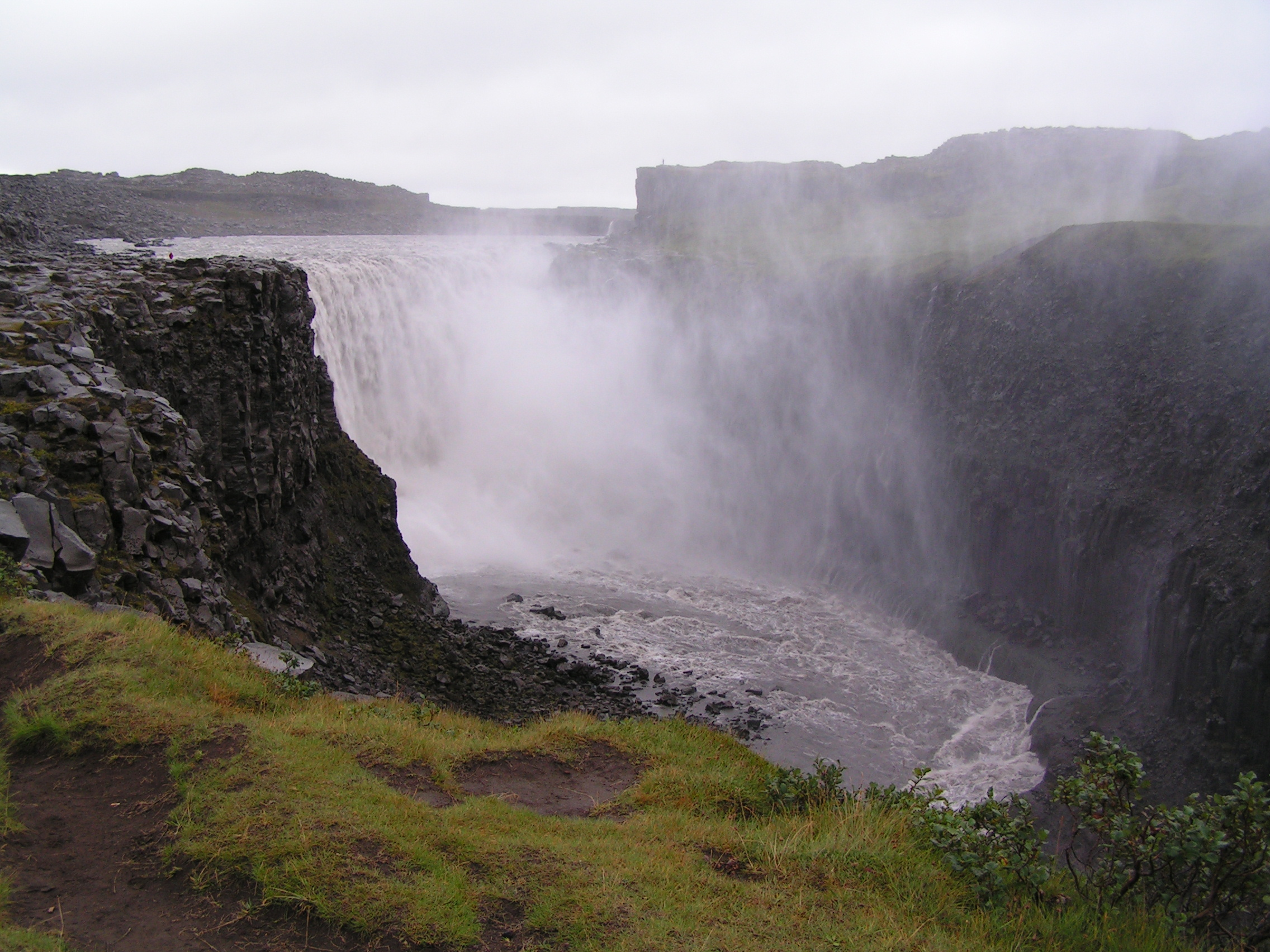 Dettifoss waterwall